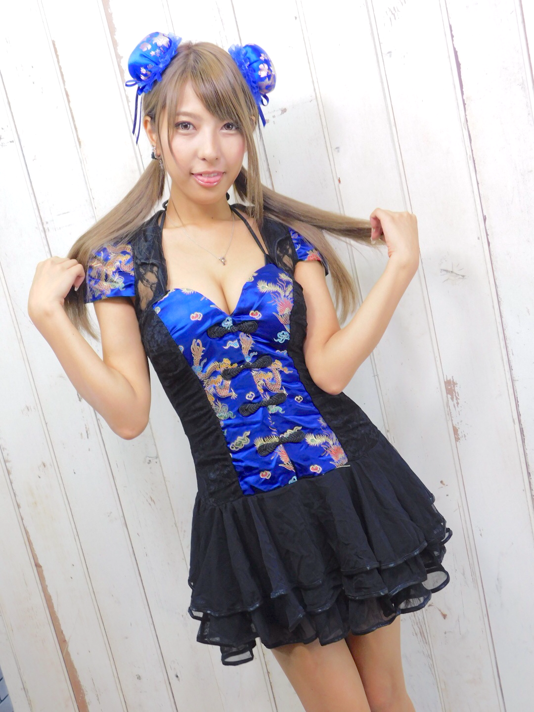 2019年9月8日秋葉原イベント撮影画像